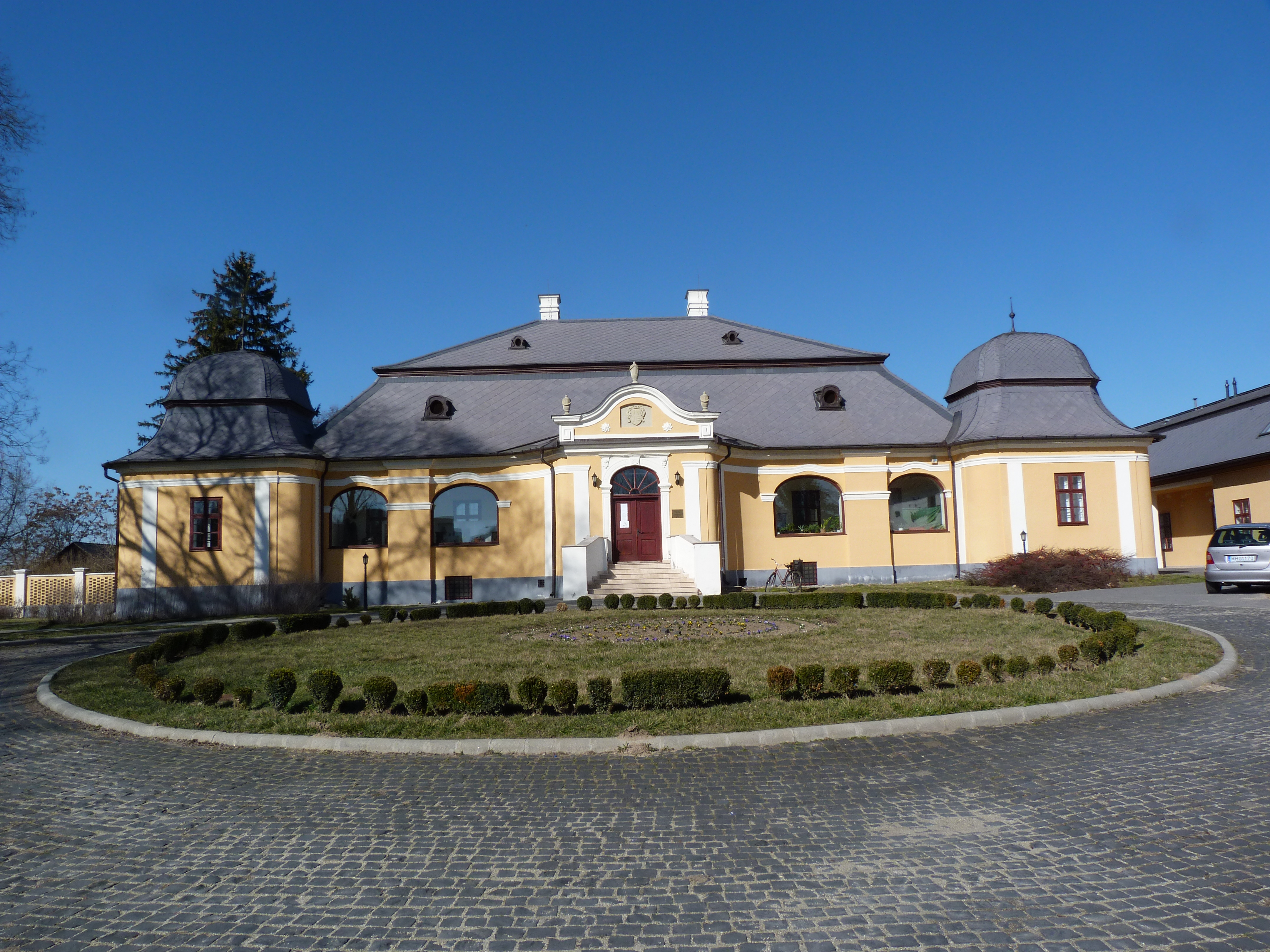 Tomcsányi-kastély. Műemléki azonosító 8532. Középiskolás kollégium, volt Tomcsányi-kastély. Épült a 17. sz. első harmadában a Lónyai család részére. Bővítve 1728 körül, majd 1810-ban.- Szabolcs-Szatmár-Bereg m., Vásárosnamény, Szabadság tér 26. This is a photo of a monument in Hungary, Identifier: 8532